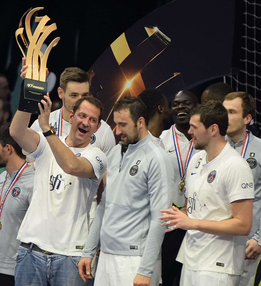 Mladen Bojinovic soulevant le trophée de la coupe de France de handball. A ses côtés Igor Vori (n°9), Jakov Gojun (n°15). Au stade Pierre de Coubertin à Paris 16e, le 26 avril 2015.